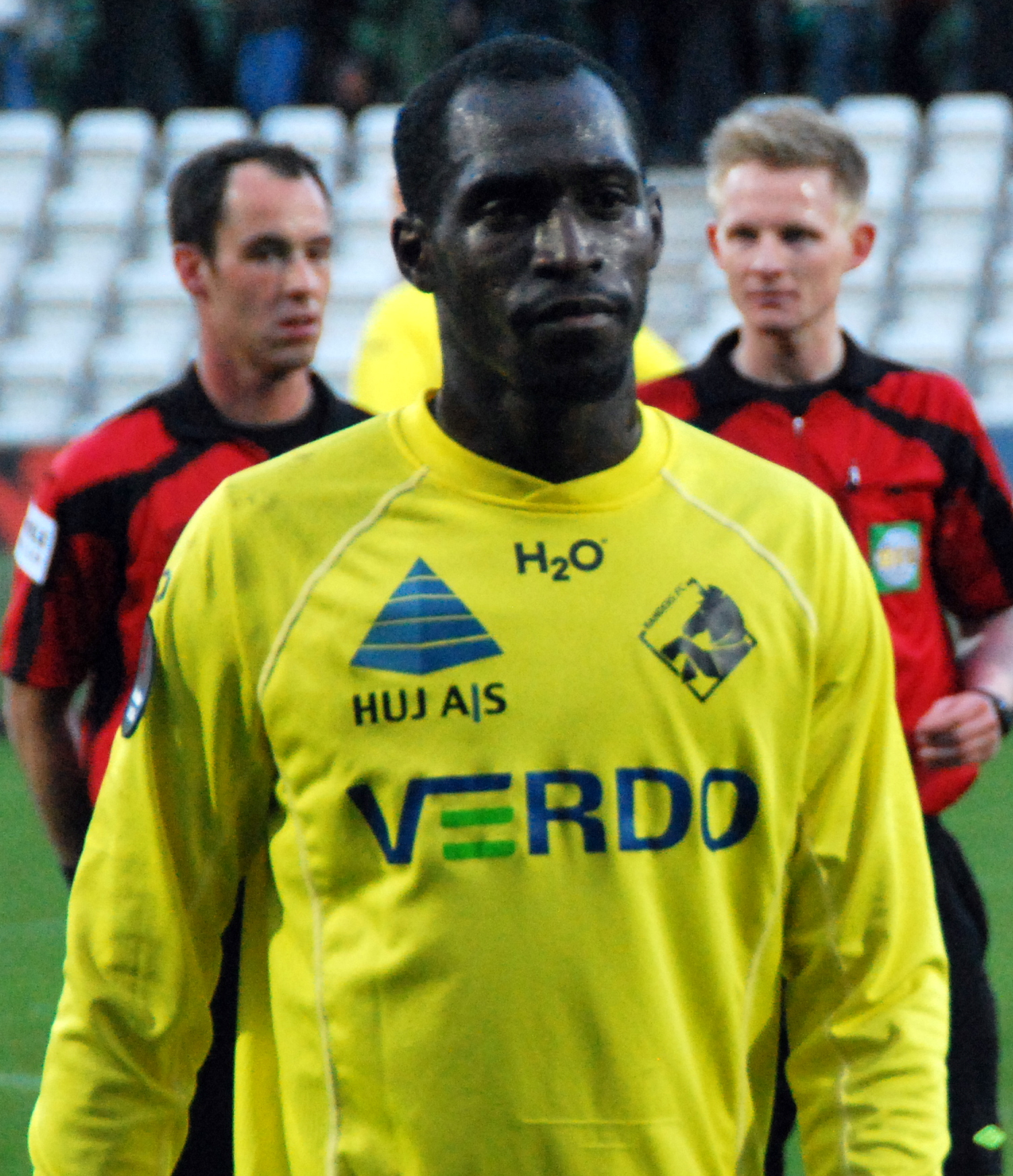 Fodboldspilleren Tidiane Sane fra Randers FC. Her under en 1. divisionskamp mod Viborg FF på Viborg Stadion.